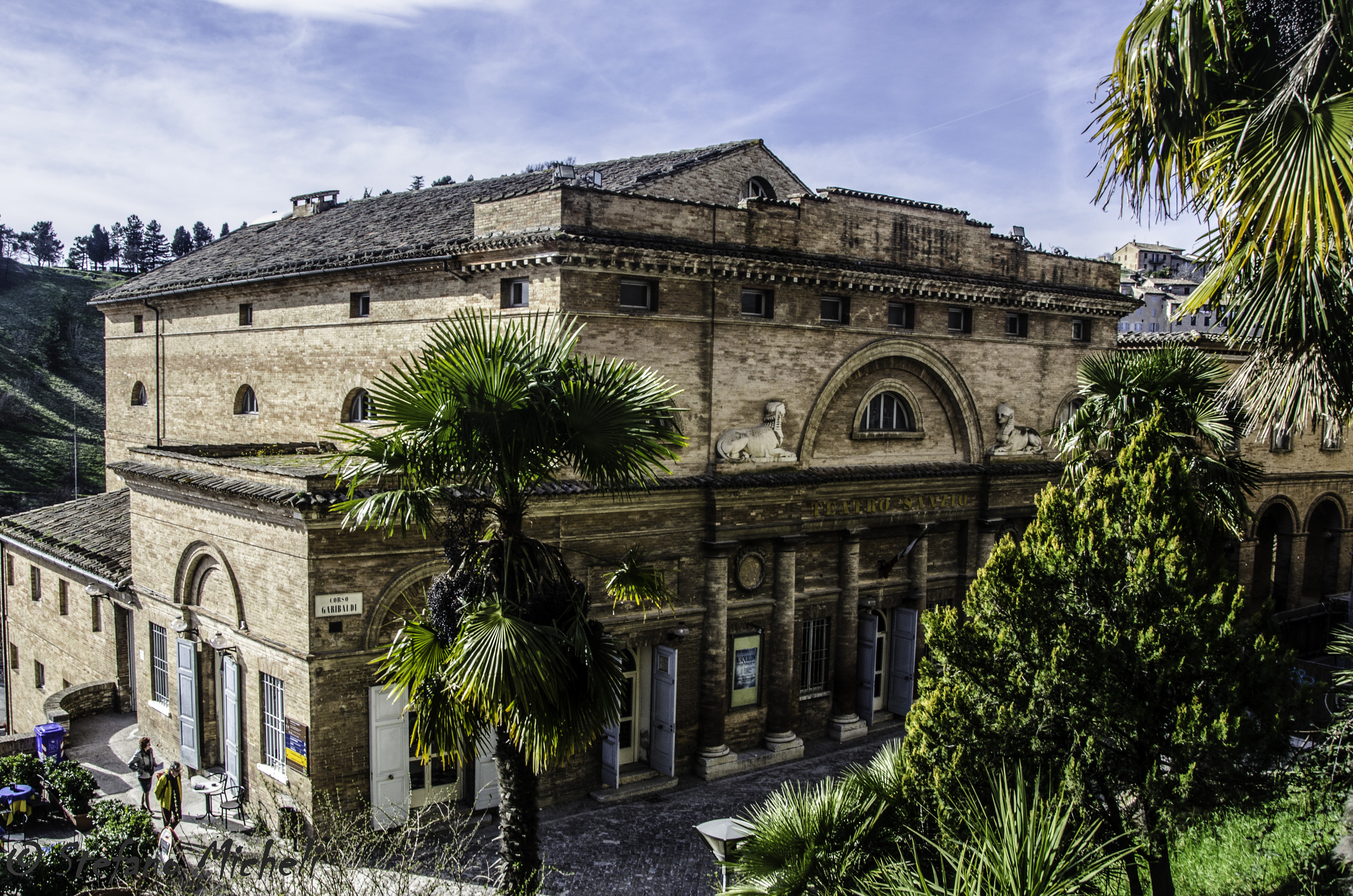 Teatro Sanzio This is a photo of a monument which is part of cultural heritage of Italy.